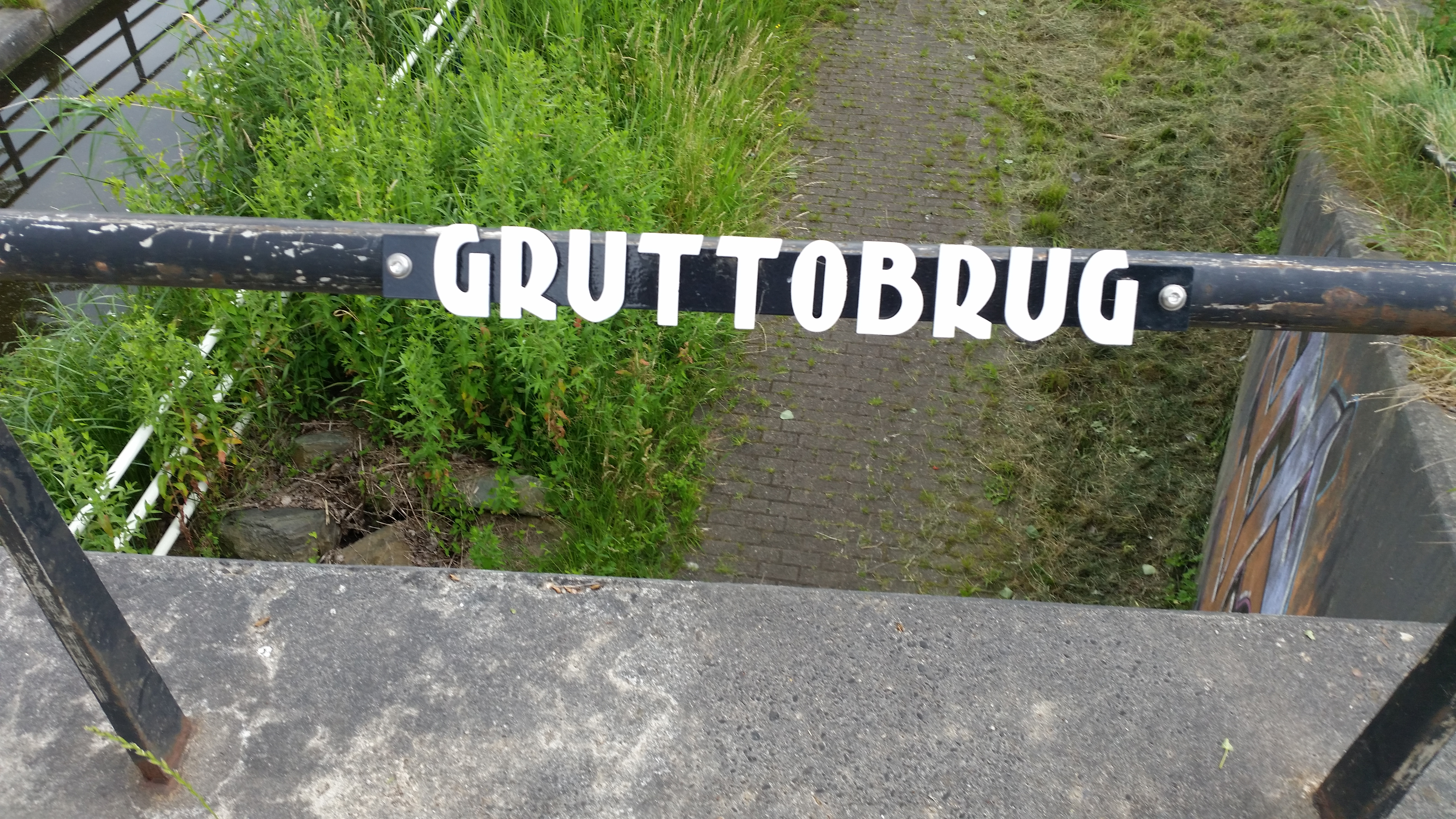 Brug 471, Gruttobrug, naamplaatje